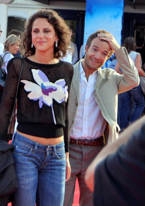 Emma Luchini et Jonathan Lambert au festival de Deauville